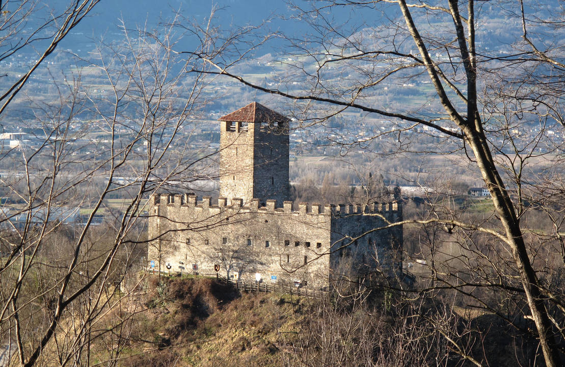 Veduta del castello di Zumelle, nel comune di Borgo Valbelluna.